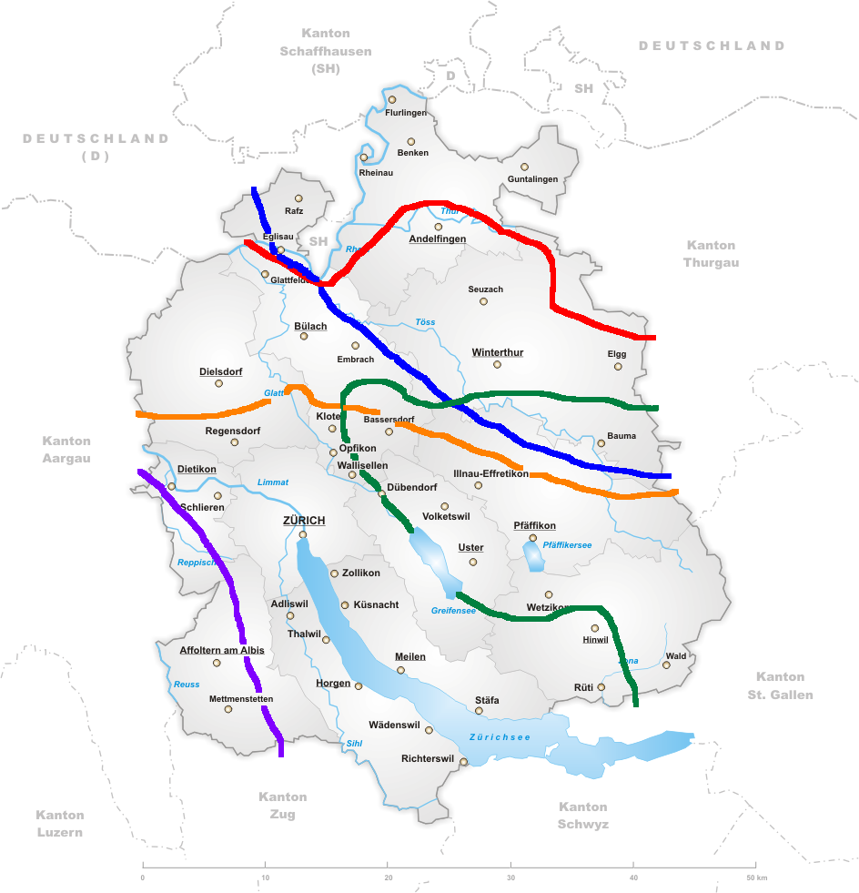 Sprachenkarte des Kantons Zürich rote Linie: Wëschpi/Wäschpi, eng/äng grüne Linie: Aabig/Oobig blaue Linie: nid/nöd orange Linie: e Chind/es Chind (vereinfacht) violette Linie: Summer/Sumer, machid/mached, olt/alt Quelle: auf einer Wiki-GFDL-Karte aufgebaut nach: [Schobinger?]: Züritüütsch. Zürich: Zürcher Kantonalbank, 1979